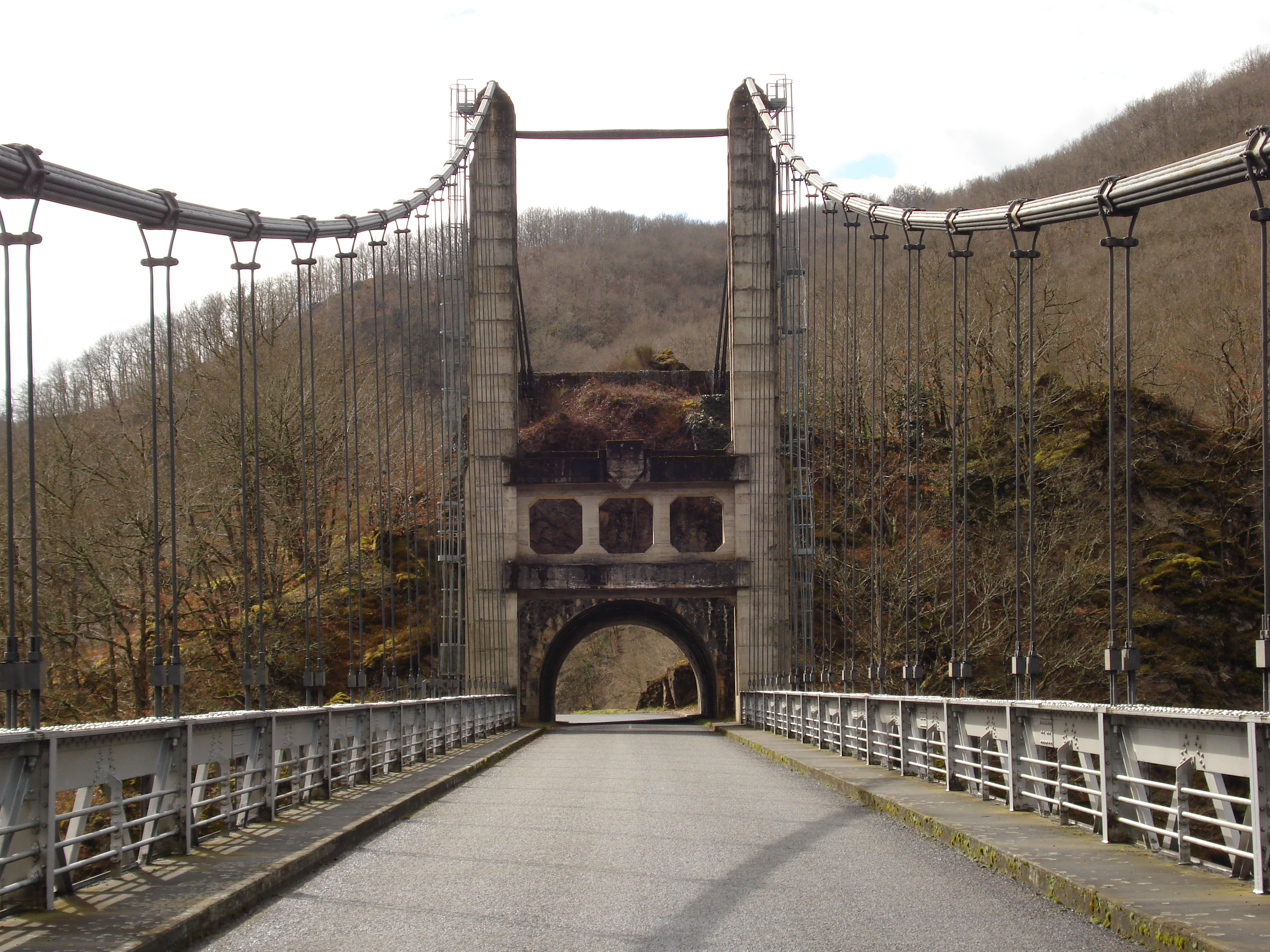 Pont de Saint-Projet, le pylône et le petit tunnel coté Cantal